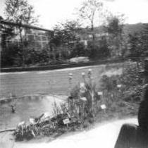 Bundesgartenschau 1957 in Köln